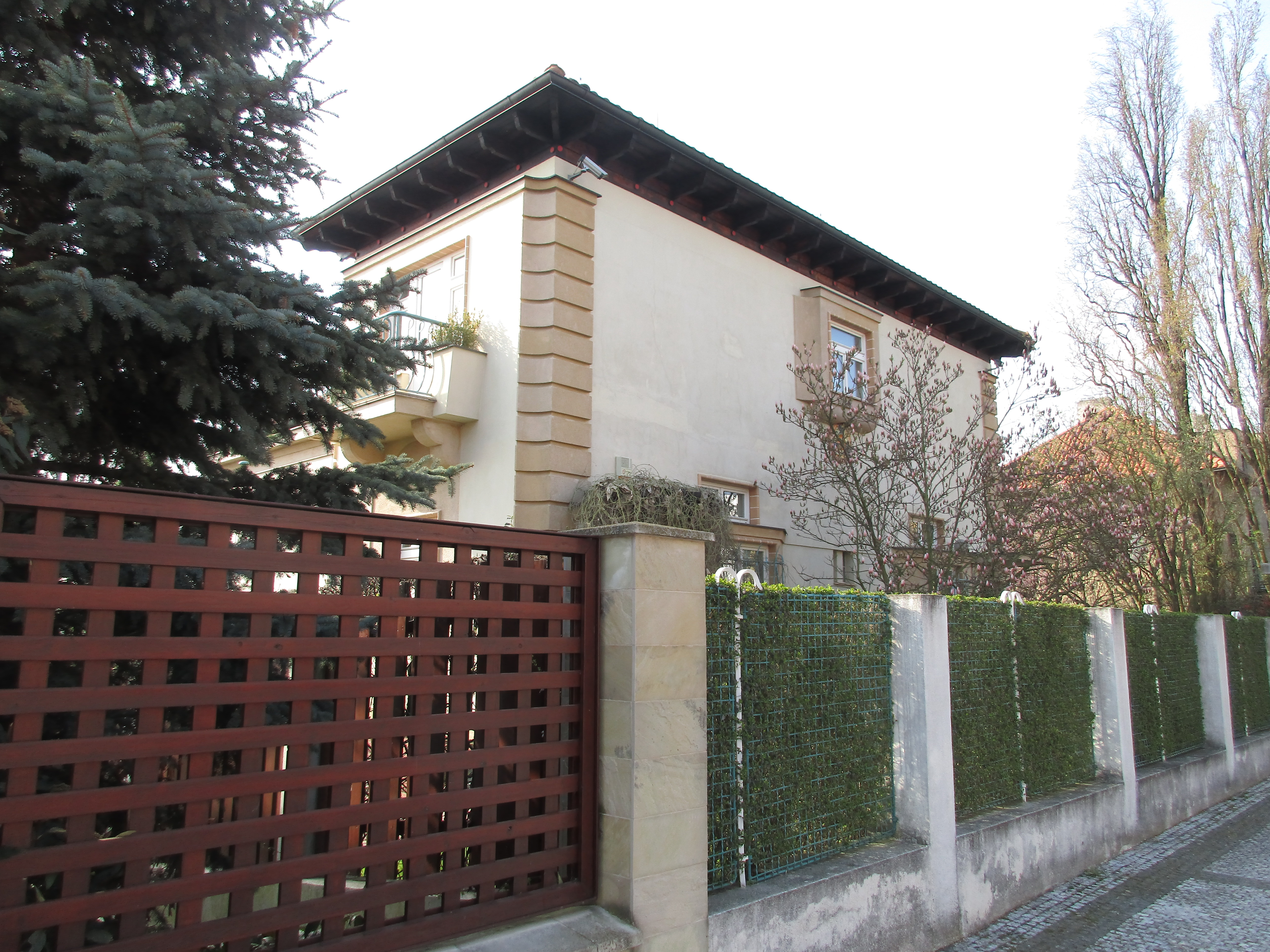 Lumiérů 440/28, Praha 5-Hlubočepy